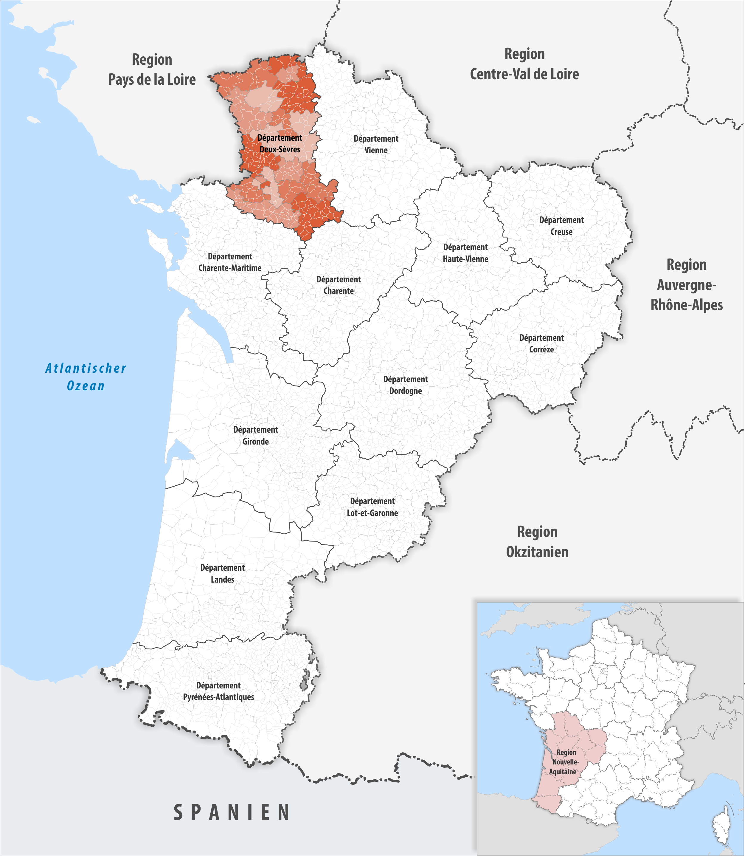 Lage des Departements Deux-Sèvres